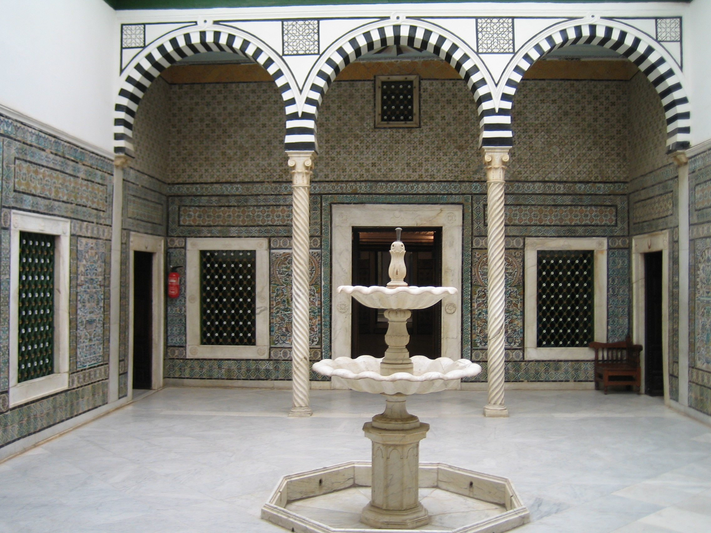 Muzeum Narodowe w Bardau.